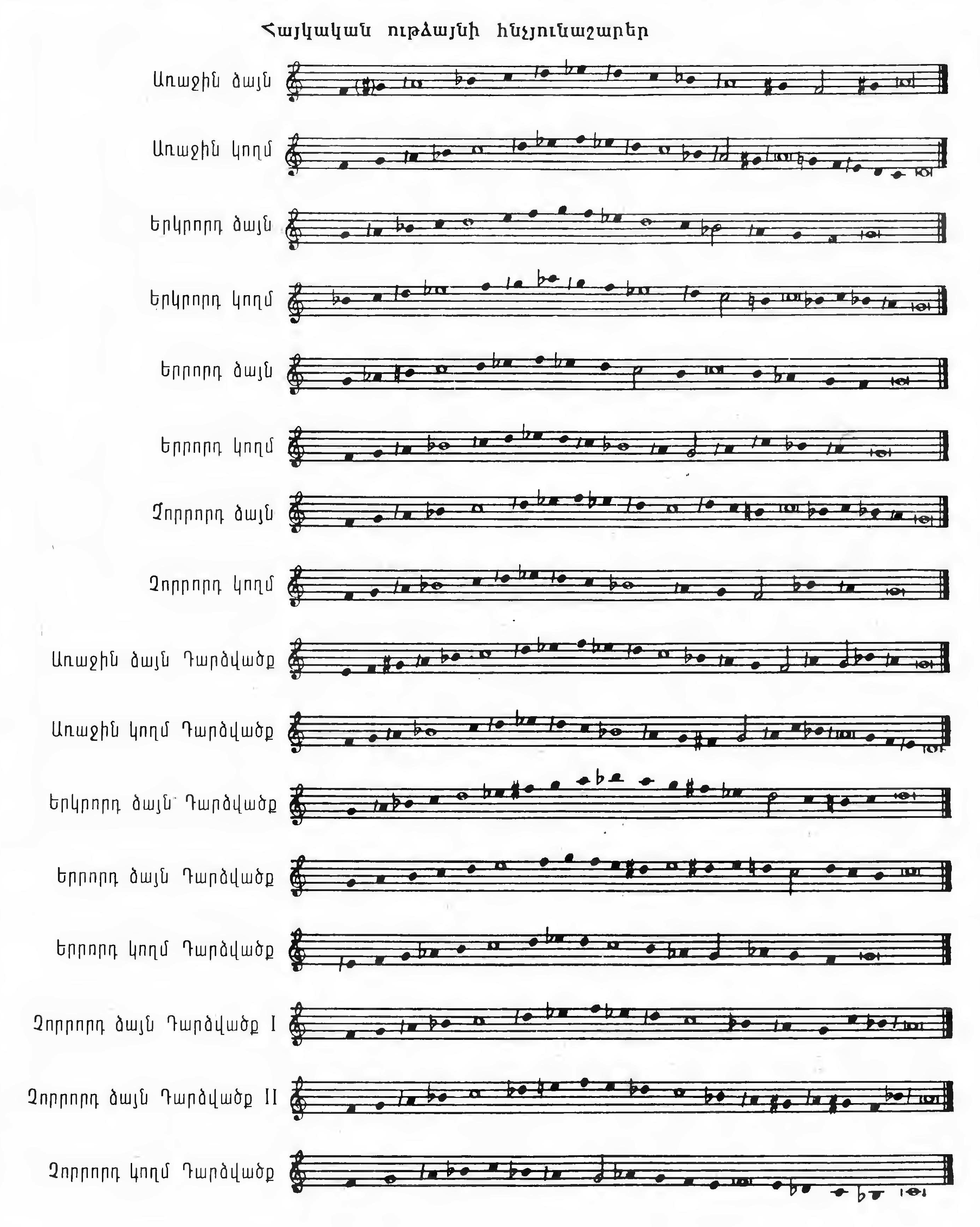 Հայկական ութձայնի հնչյունաշարեր